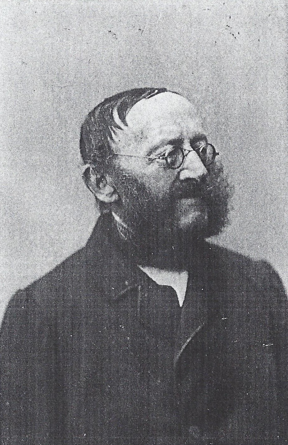 Porträtfotograie von Friedrich Stavenhagen (1796-1869)